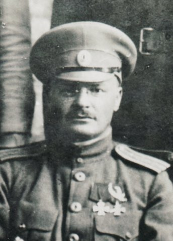 Полковник Михаил Антонович Жебрак-Рустанович